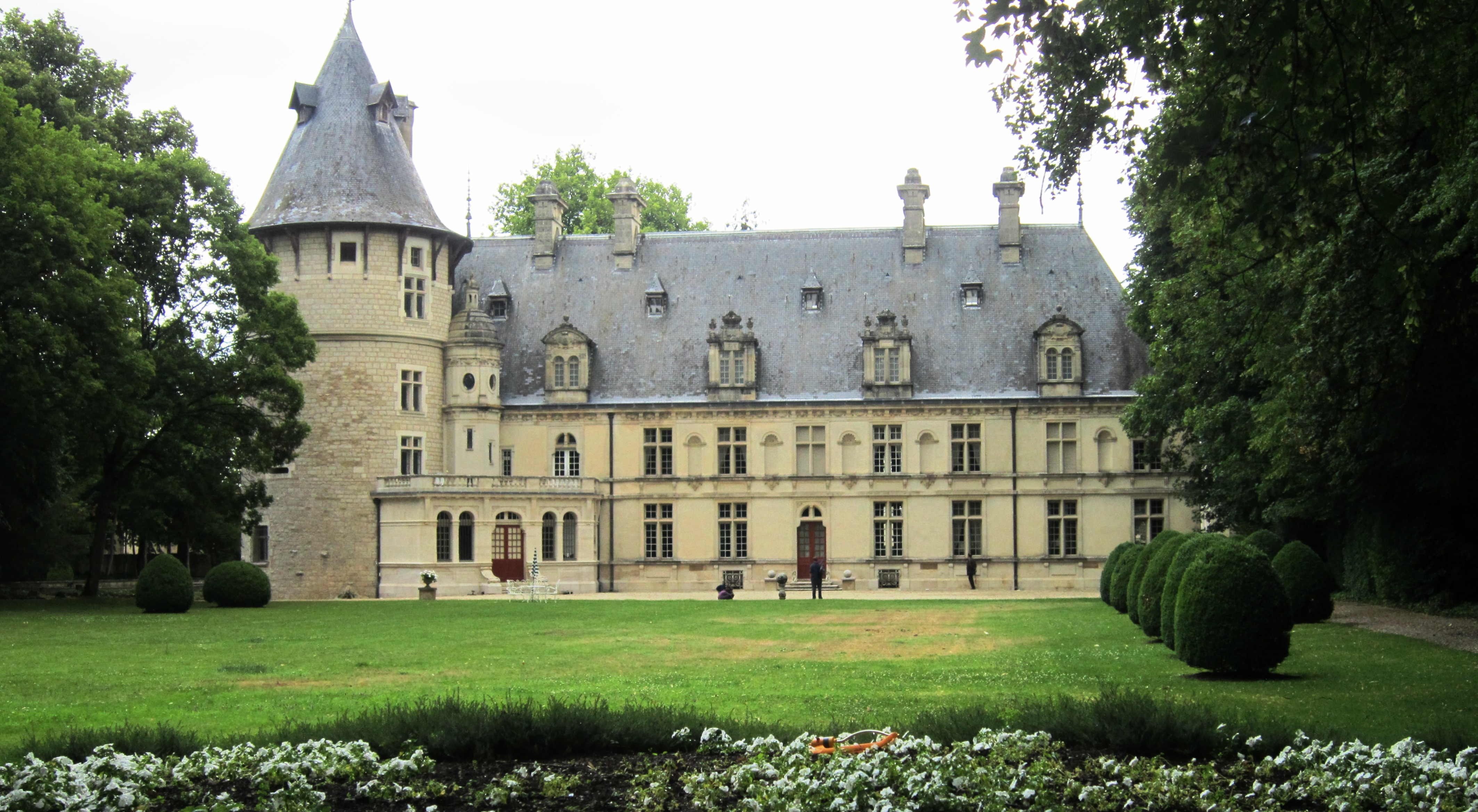 Château de Montigny-sur-Aube (Côte-d'Or)